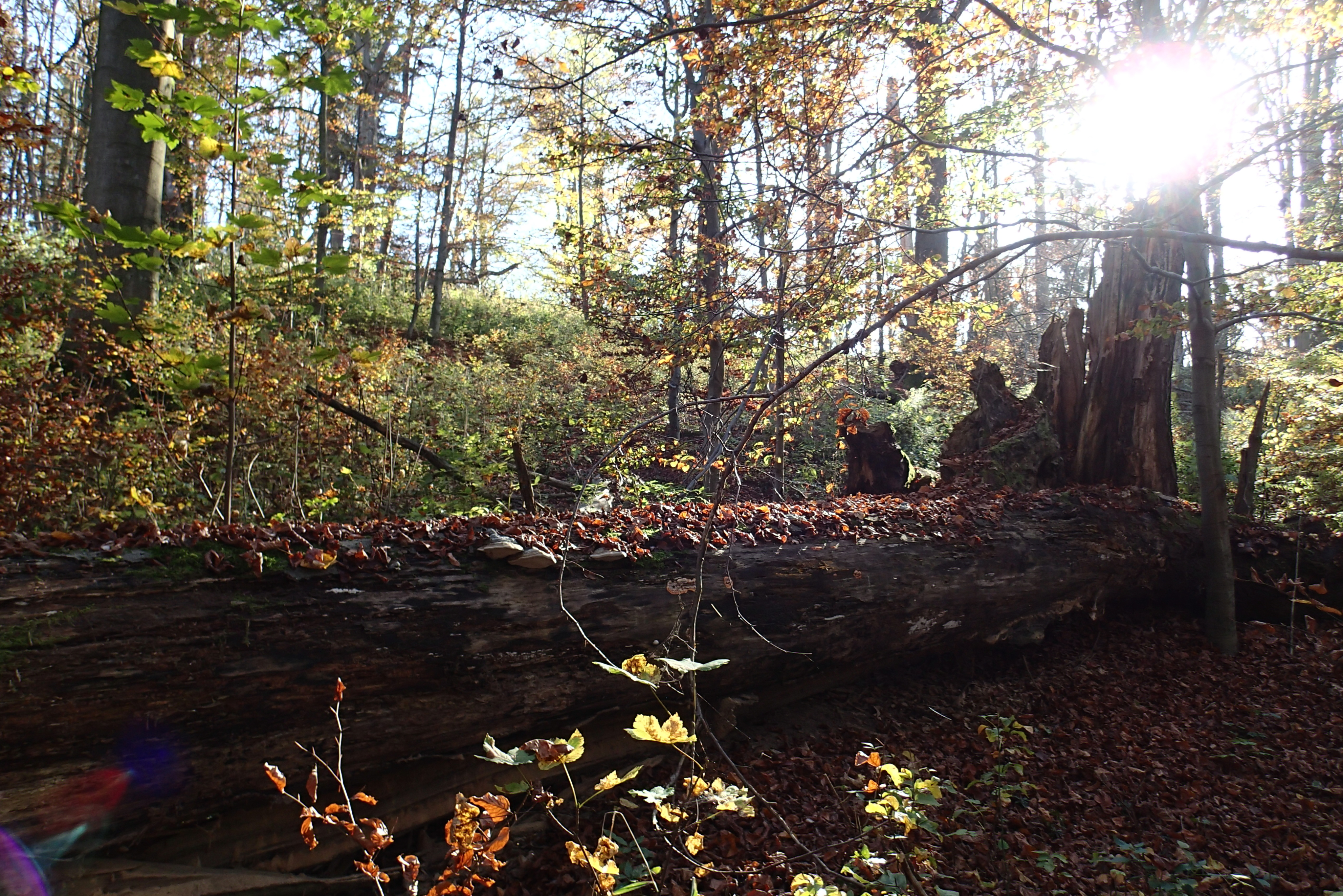 Jeden z padlých stromů v rezervaci Kokšín